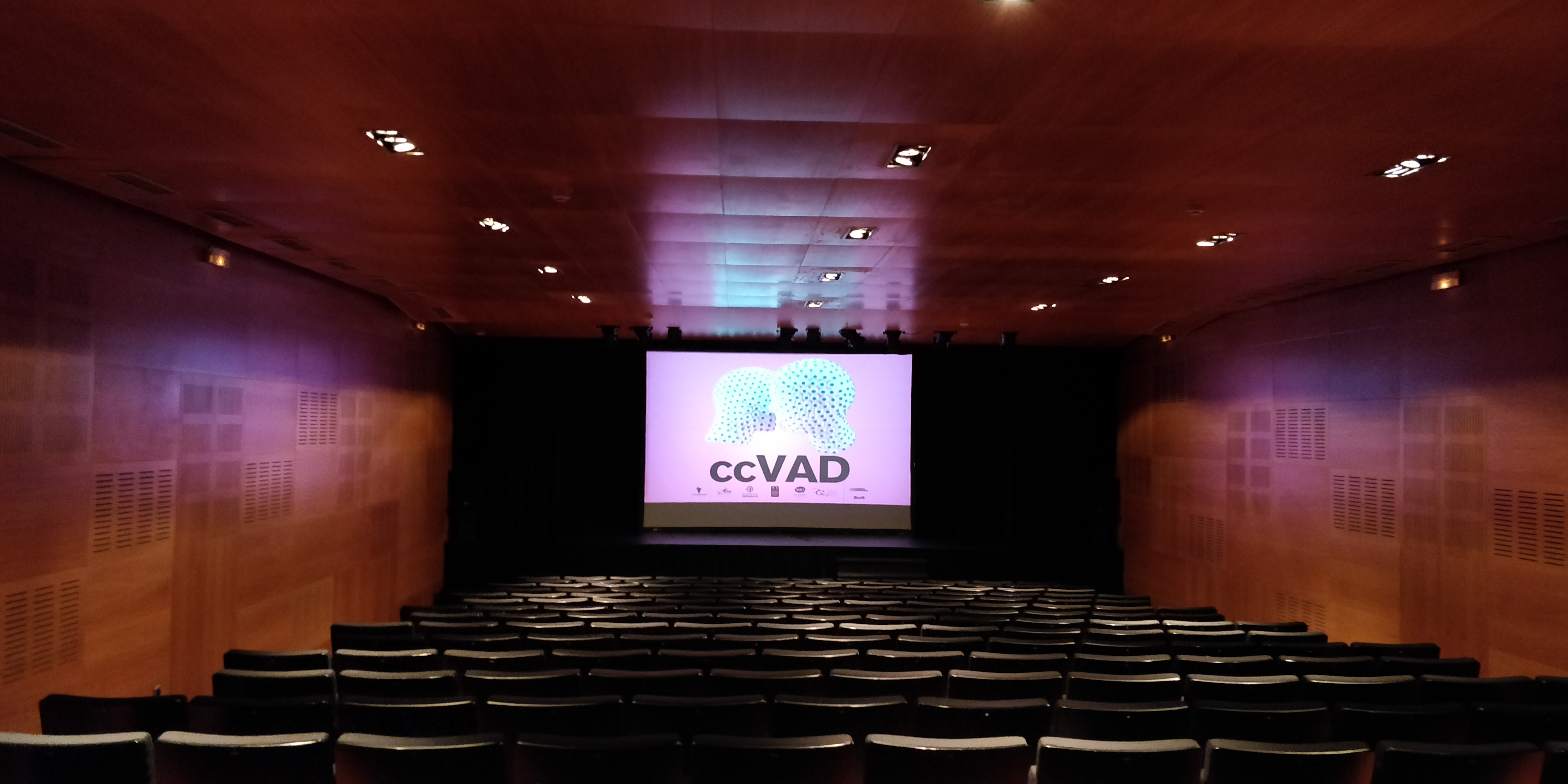 Pantalla de inicio de la quinta edición del Valladolid Creative Commons Film Festival en la Sala Delibes del Teatro Calderón.